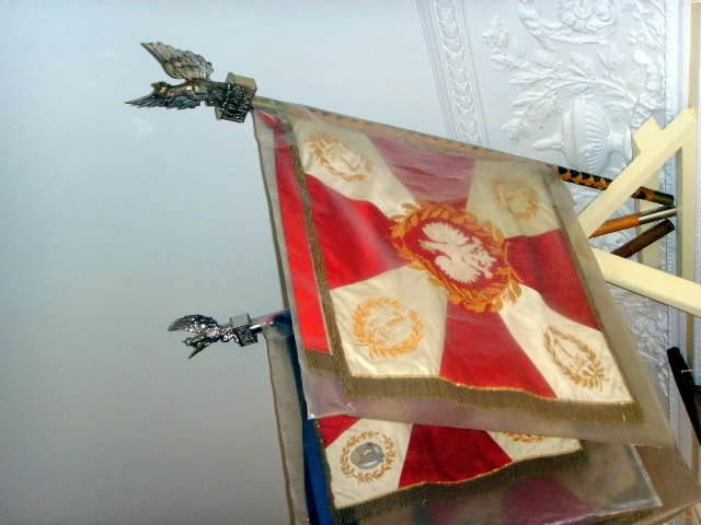 eksponaty Muzeum im. Sikorskiego w Londynie. Sztandar - 7 Pułk Pancerny